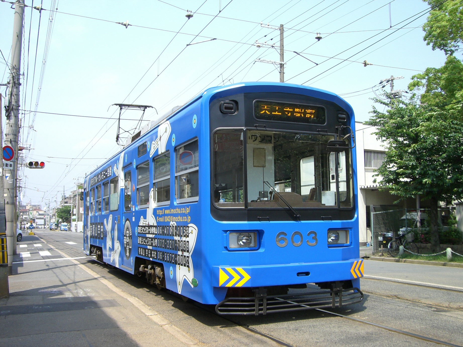 Hankai_Tramway（阪堺電気軌道上町線）